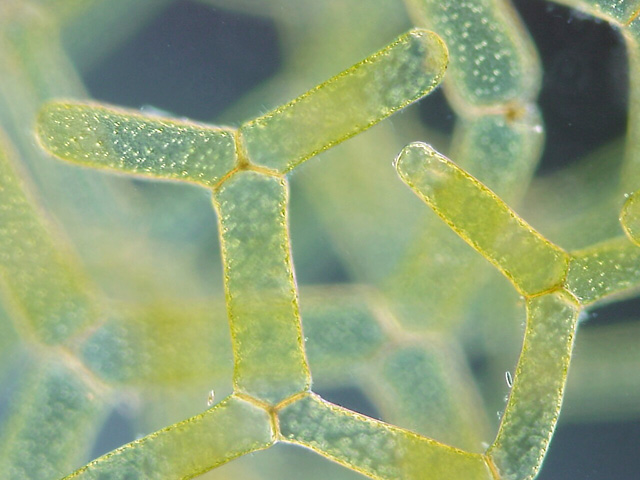 Hydrodictyon reticulatum / from Sugaonuma-Pond, Joso (or Bando), Ibaraki Pref., Japan / Microscope: Leica DMRD (DIC)